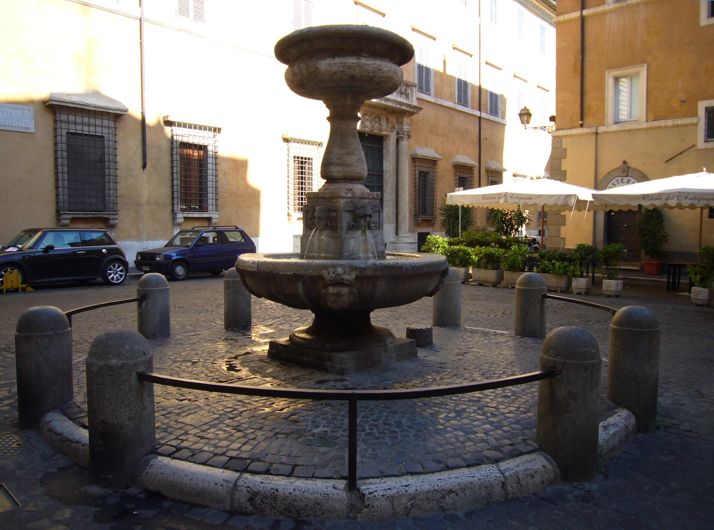 Roma, fontana di piazza san Simeone e palazzo Lancellotti